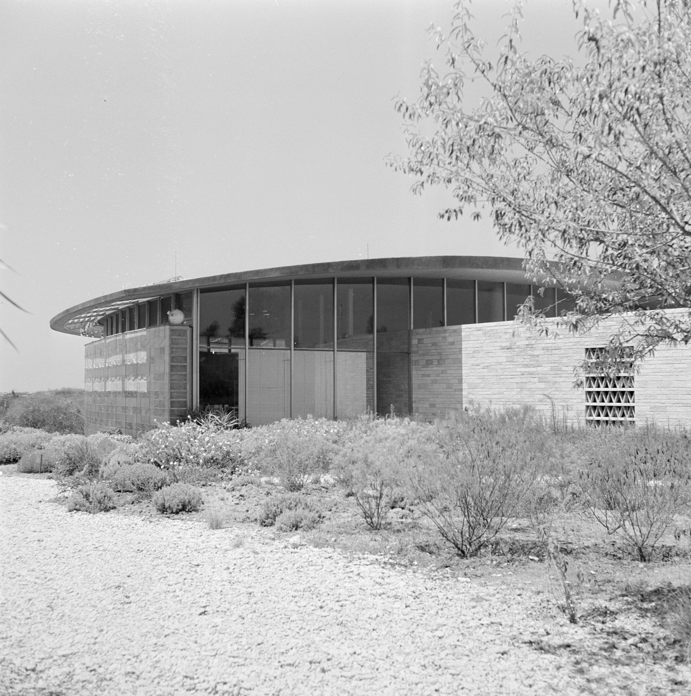 Collectie / Archief : Fotocollectie Van de Poll Reportage / Serie : Israël - Quasileh Beschrijving : Quasileh. Glasmuseum Datum : 1 januari 1963 Locatie : Israël, Qusileh Trefwoorden : architectuur, glaskunst, musea Fotograaf : Poll, Willem van de, [onbekend] Auteursrechthebbende : Nationaal Archief Materiaalsoort : Negatief (zwart/wit) Nummer archiefinventaris : bekijk toegang 2.24.14.02 Bestanddeelnummer : 255-3785